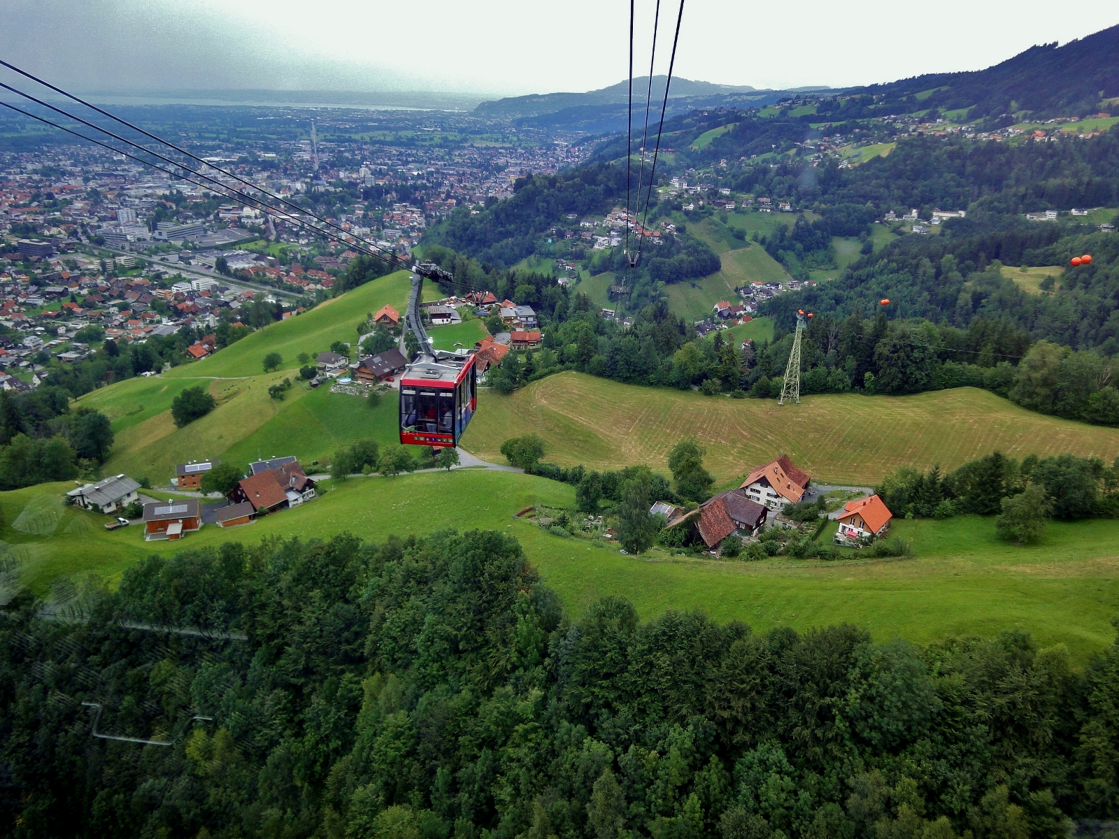 Karren Seilbahn